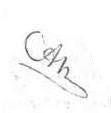 Signatur des Grafikers Friedrich Gustav Adolf Neumann, 1863.